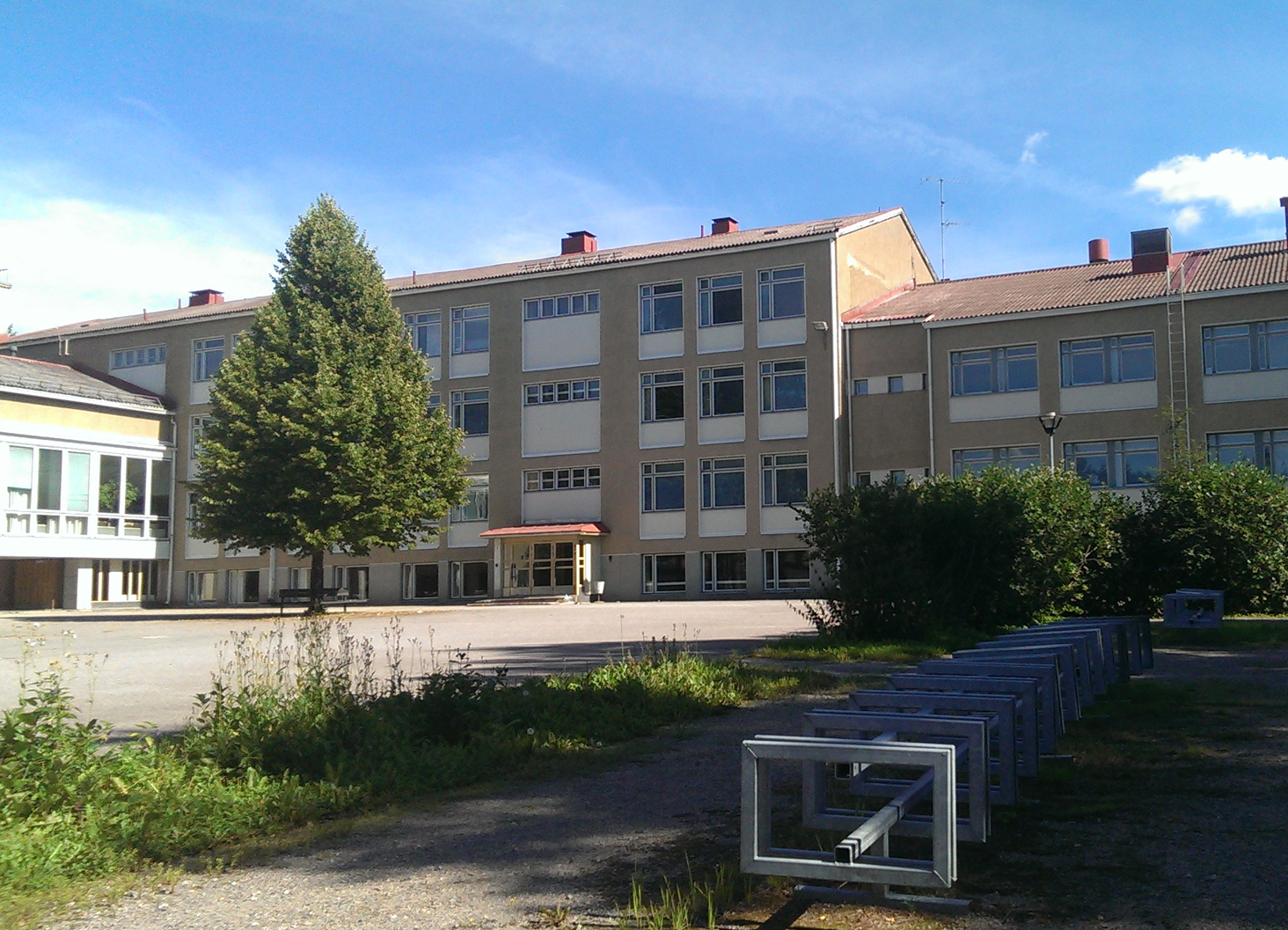 Hyvinkään yhteiskoulun takapiha